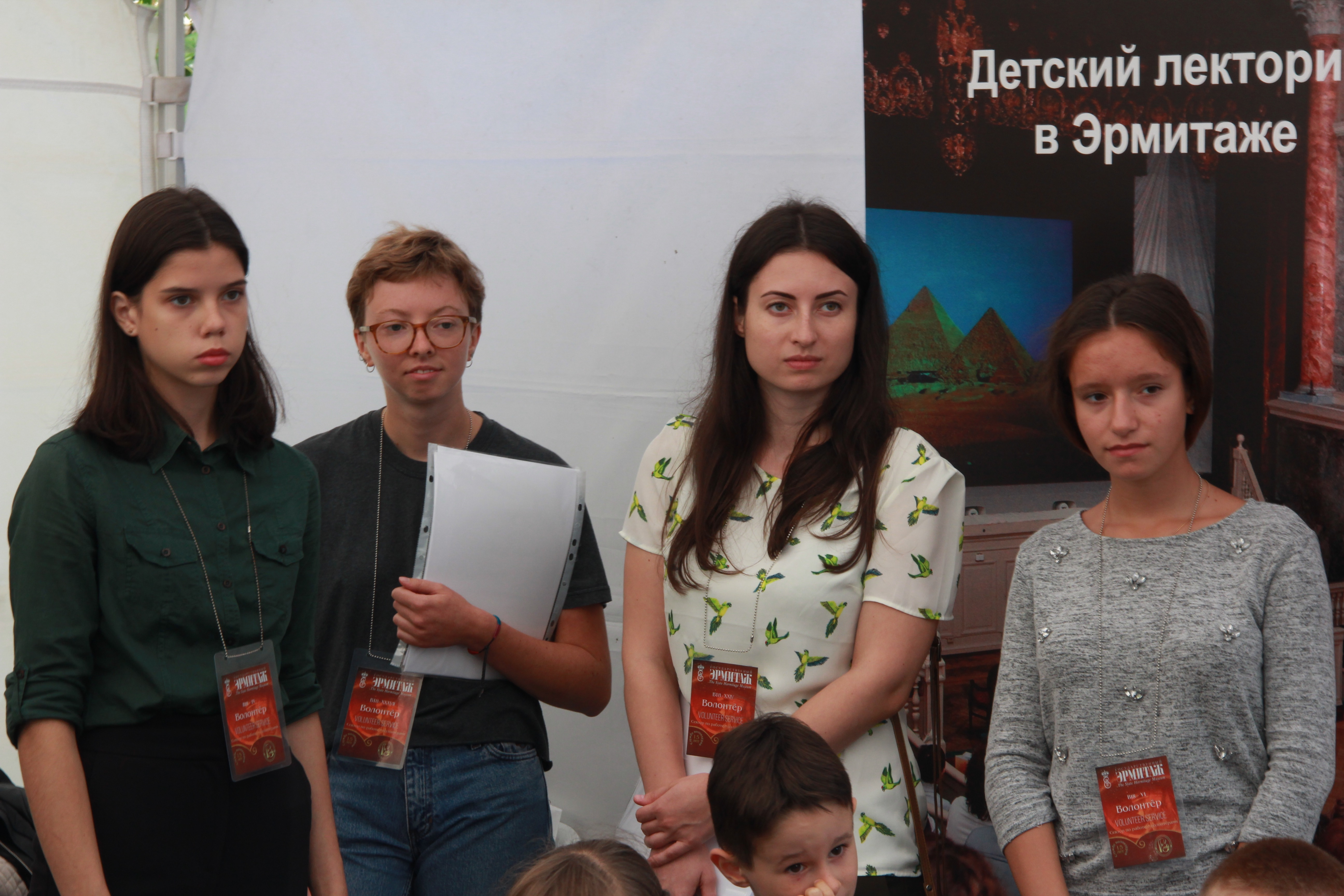 Frivililge fra Eremitagen